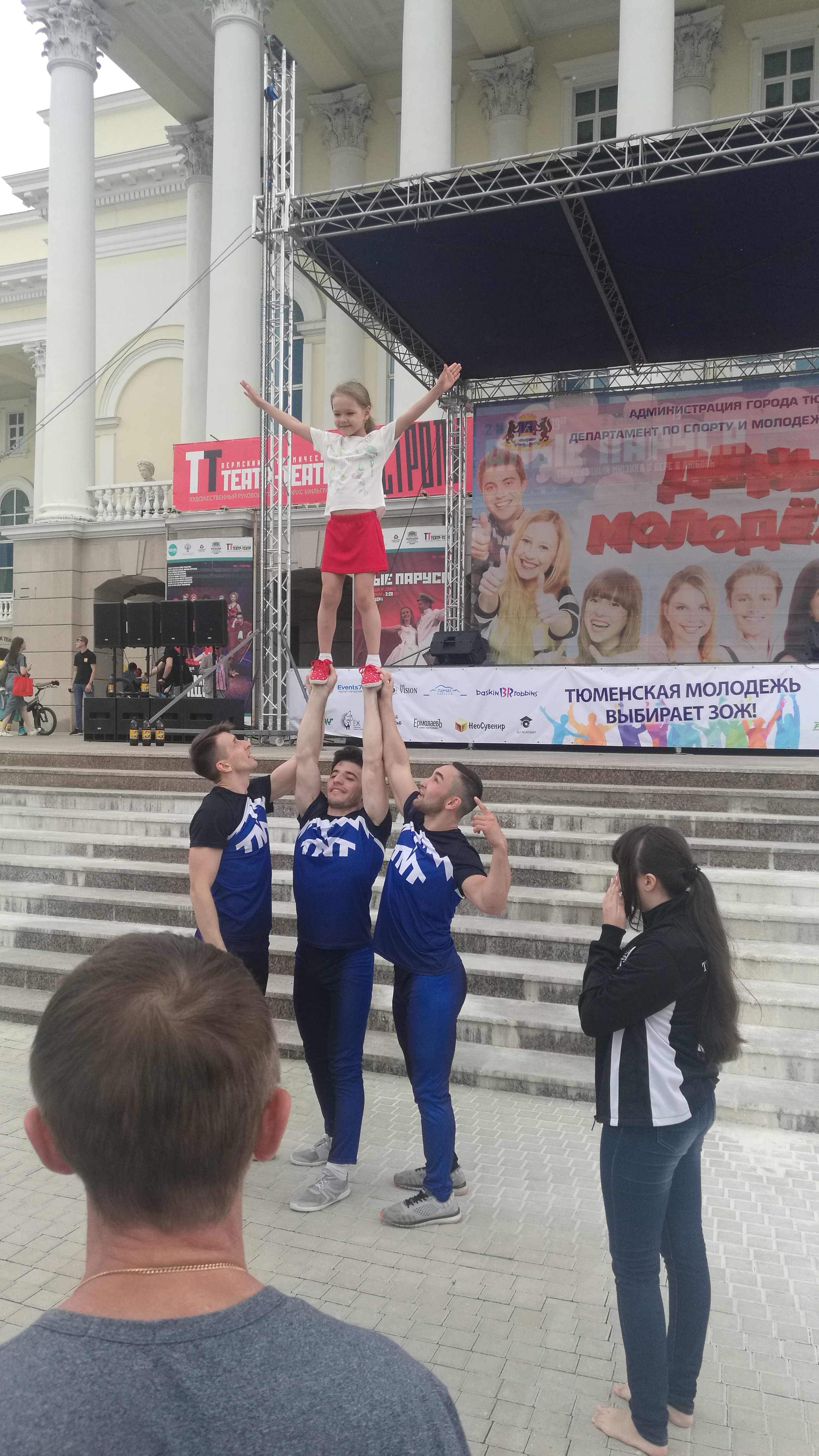 Huraŭloj subtenas knabinon dum festo, dediĉita al sana vivostilo. Placo de la 400-jariĝo de Tjumeno. Tjumeno, Rusio.